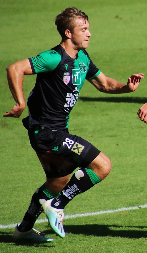 Clemens Hubmann